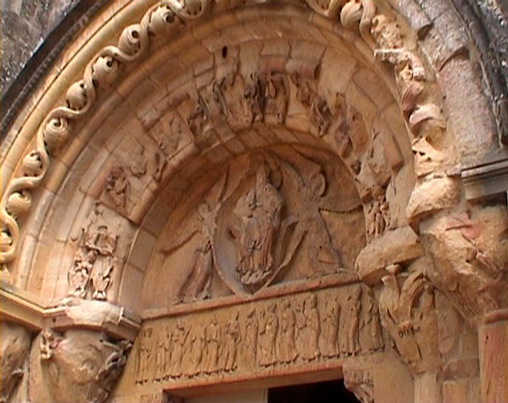 Anzy-le-Duc, Burgund